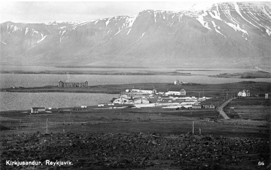 Kirkjusandur í Reykjavík. Mynd frá skömmu fyrir 1920. Lengst til vinstri má sjá Holdsveikraspítalann en fyrir miðju er fiskverkunarhús Th. Thorsteinssonar og Íslandsfélagsins á Kirkjusandi. Til hægri má sjá býlin Kirkjuból og Bjarmaland.